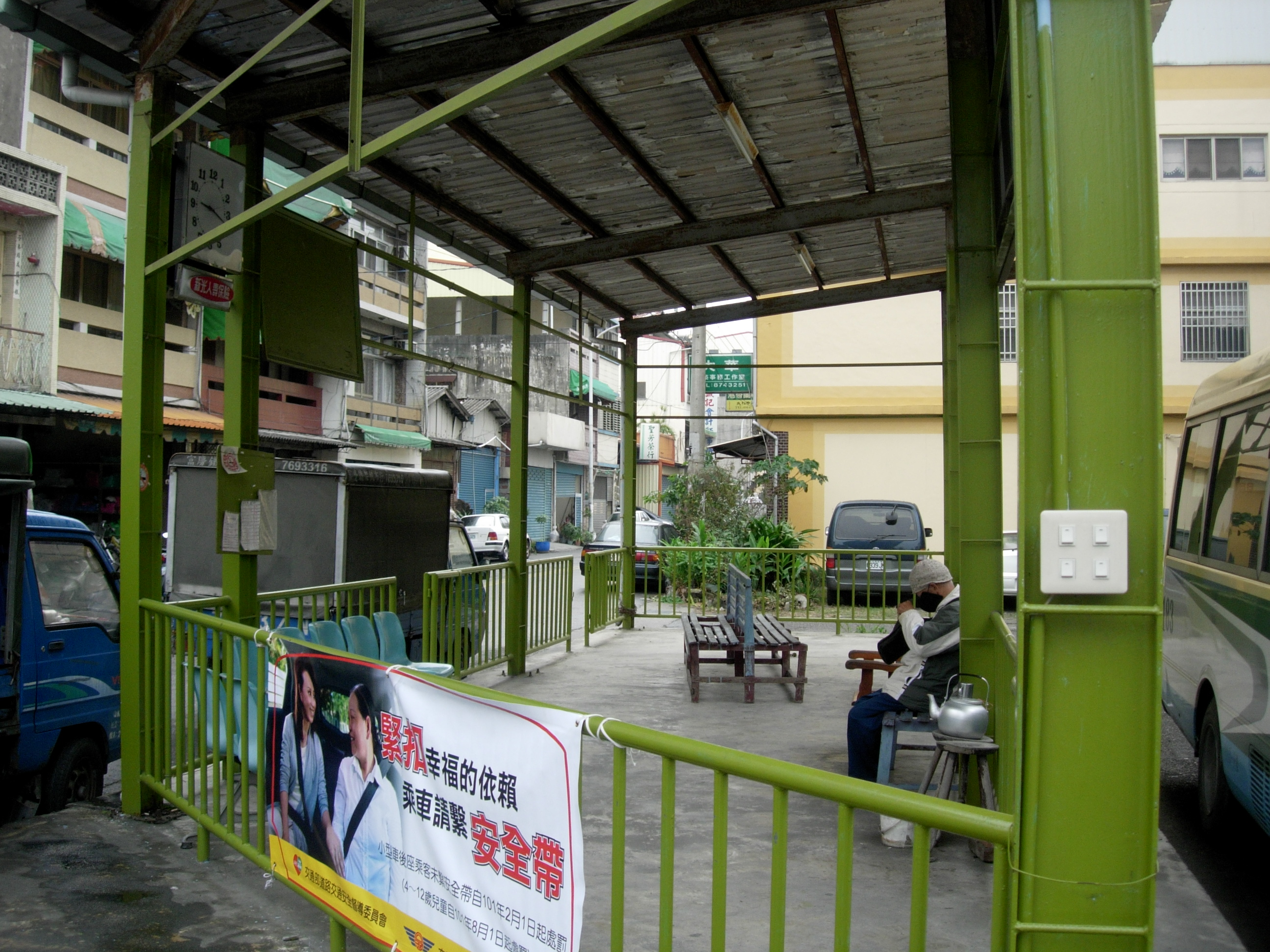 中文（台灣）: 彰化客運田中站候車處。